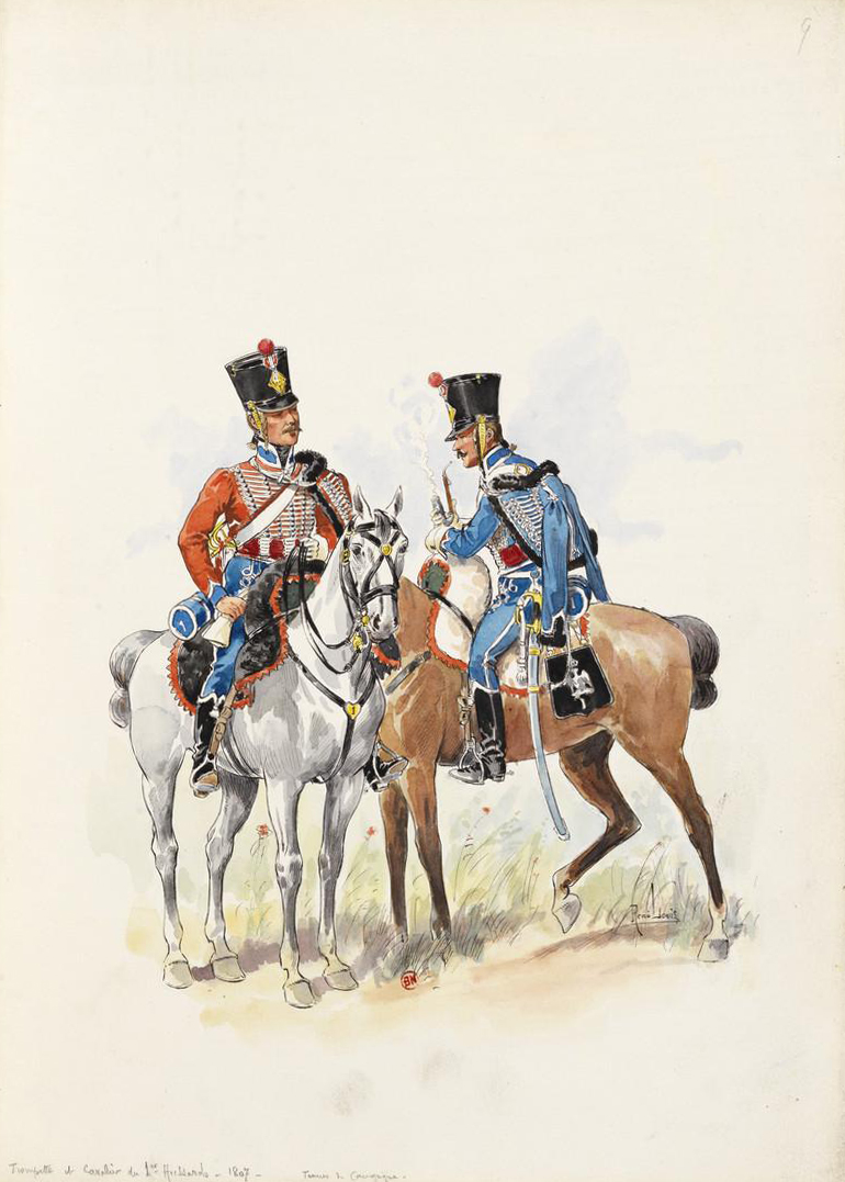 Trompette et cavalier du 1er Hussards en tenue de campagne en 1807